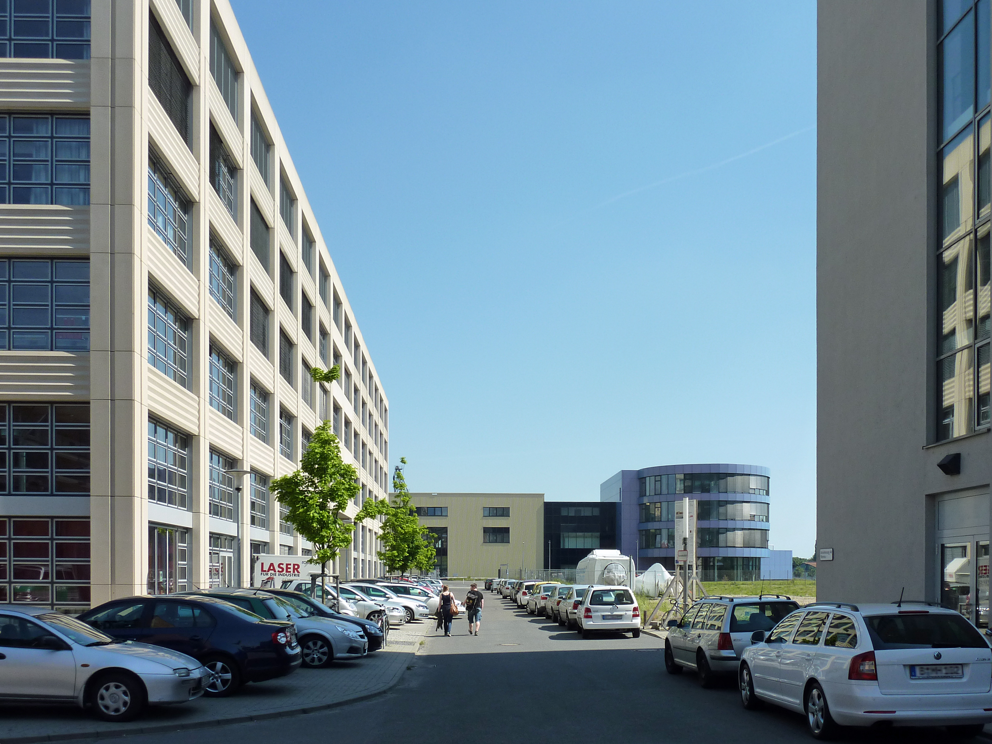 Sicht von der Johannes-Kraatz-Straße in die Ernst-Ziesel-Straße, auf dem Campus Wilhelminenhof in Berlin-Oberschöneweide.